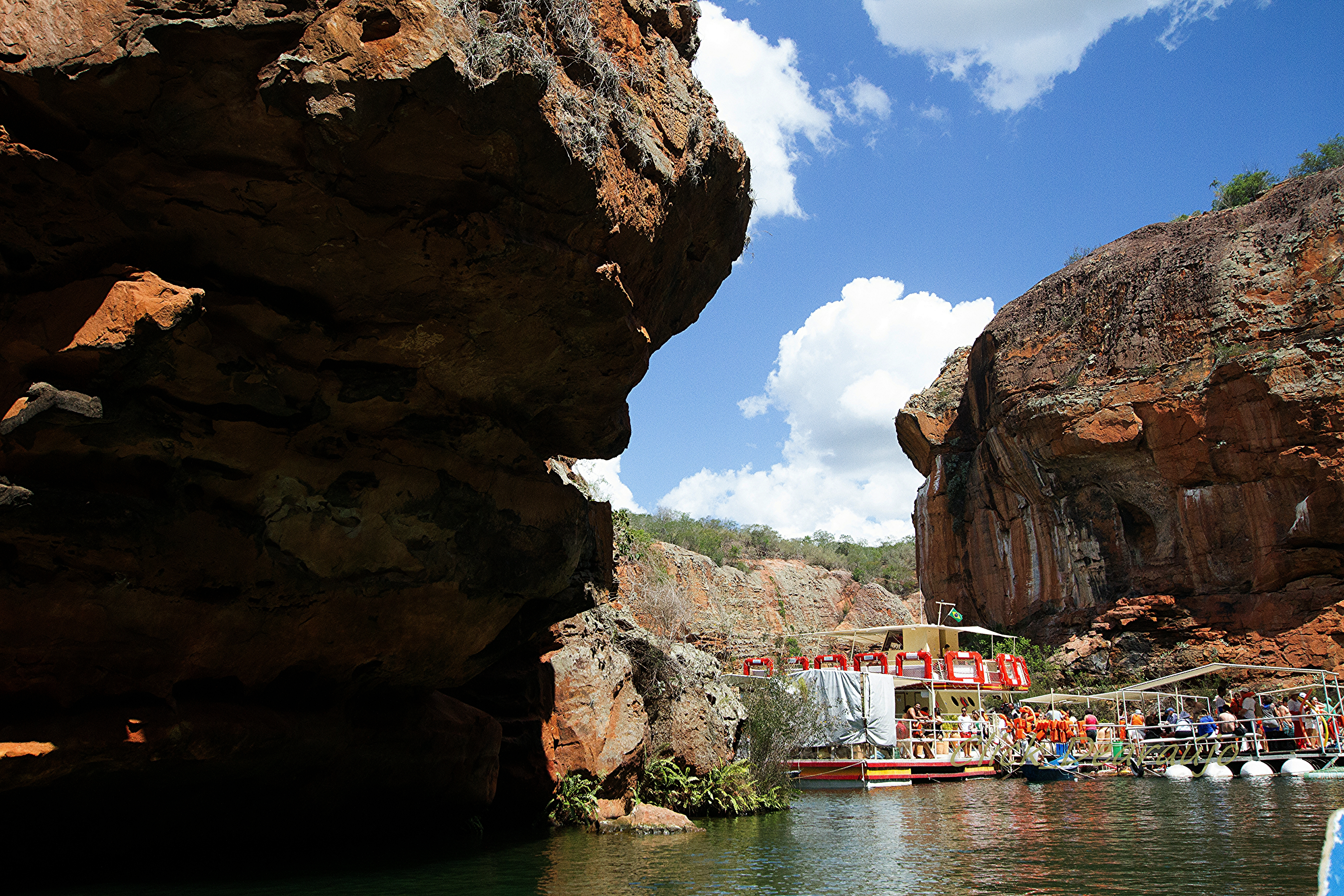 Férias-2013